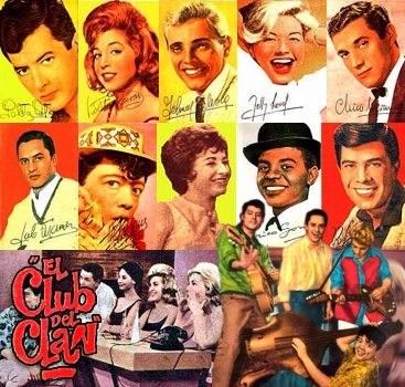 El elenco de El club del clan.